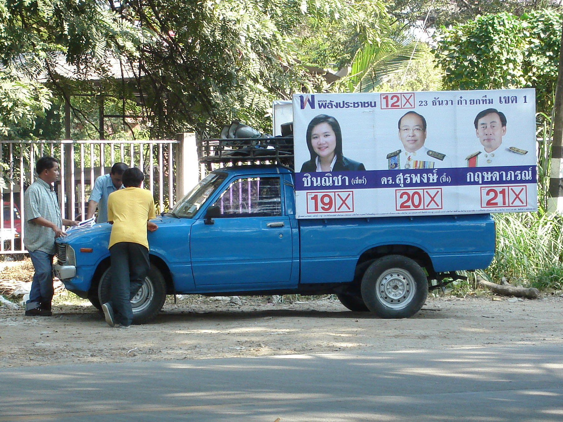 รถหาเสียง ผู้สมัครระบบแบ่งเขต พรรคพลังประชาชน -- Chiang Mai, Thailand